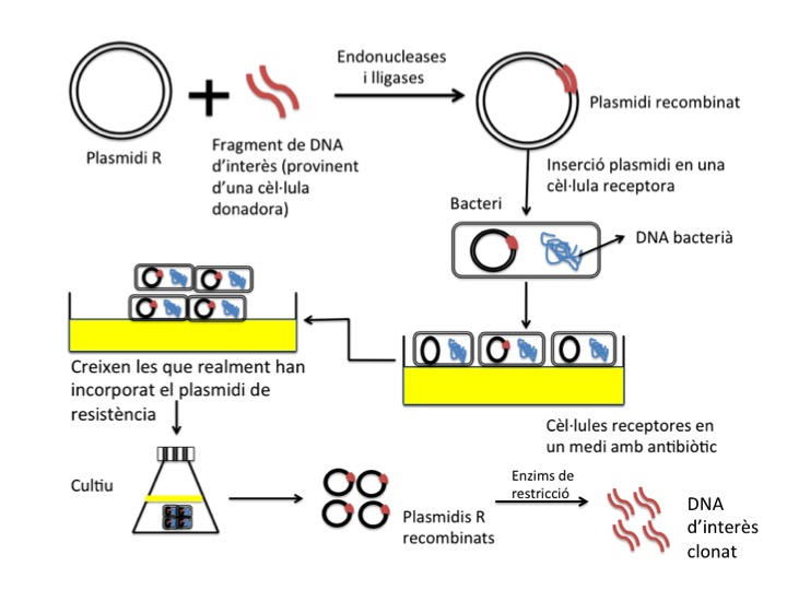 Esquema de l'ús dels plasmidis de resistència com a vectors en la clonació del DNA